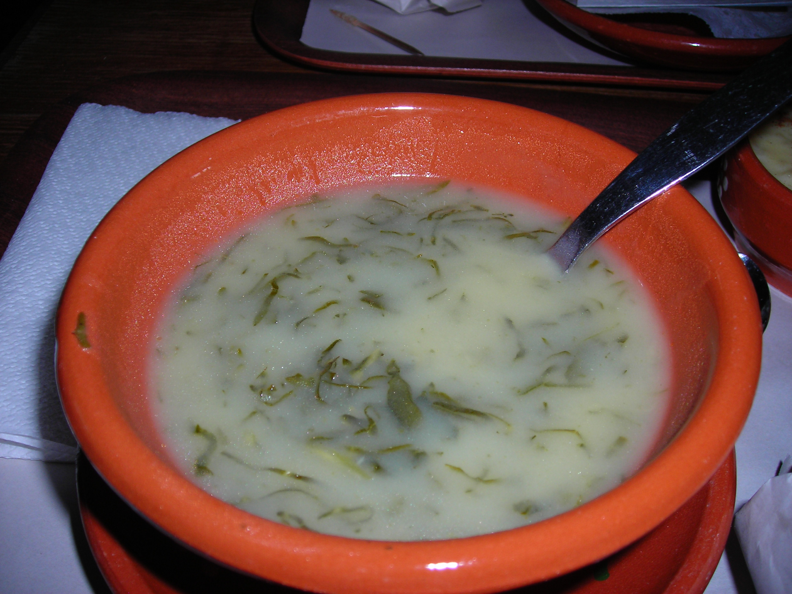 Caldo verde - Jul 2008